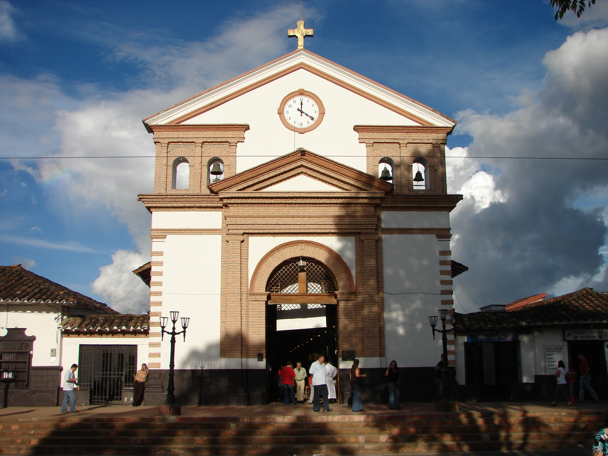 Fachada de la Iglesia de San Antonio de Pereira, en el municipio de Rionegro, Antioquia.